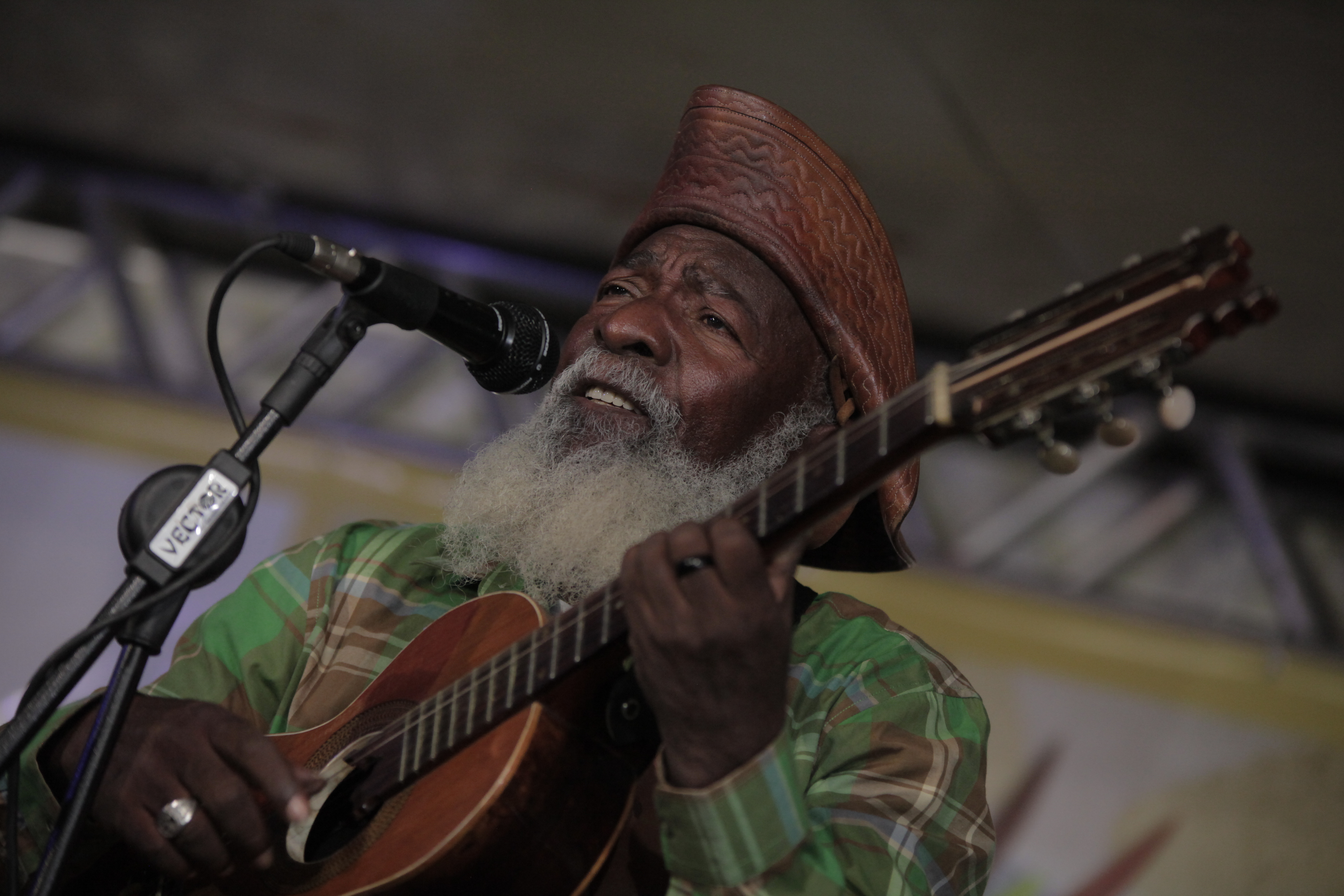 Antônio Ribeiro da Conceição - conhecido pelo pseudônimo/nome artístico de Bule-Bule (Antônio Cardoso, 22 de outubro de 1947) é um músico, repentista, escritor e poeta brasileiro.